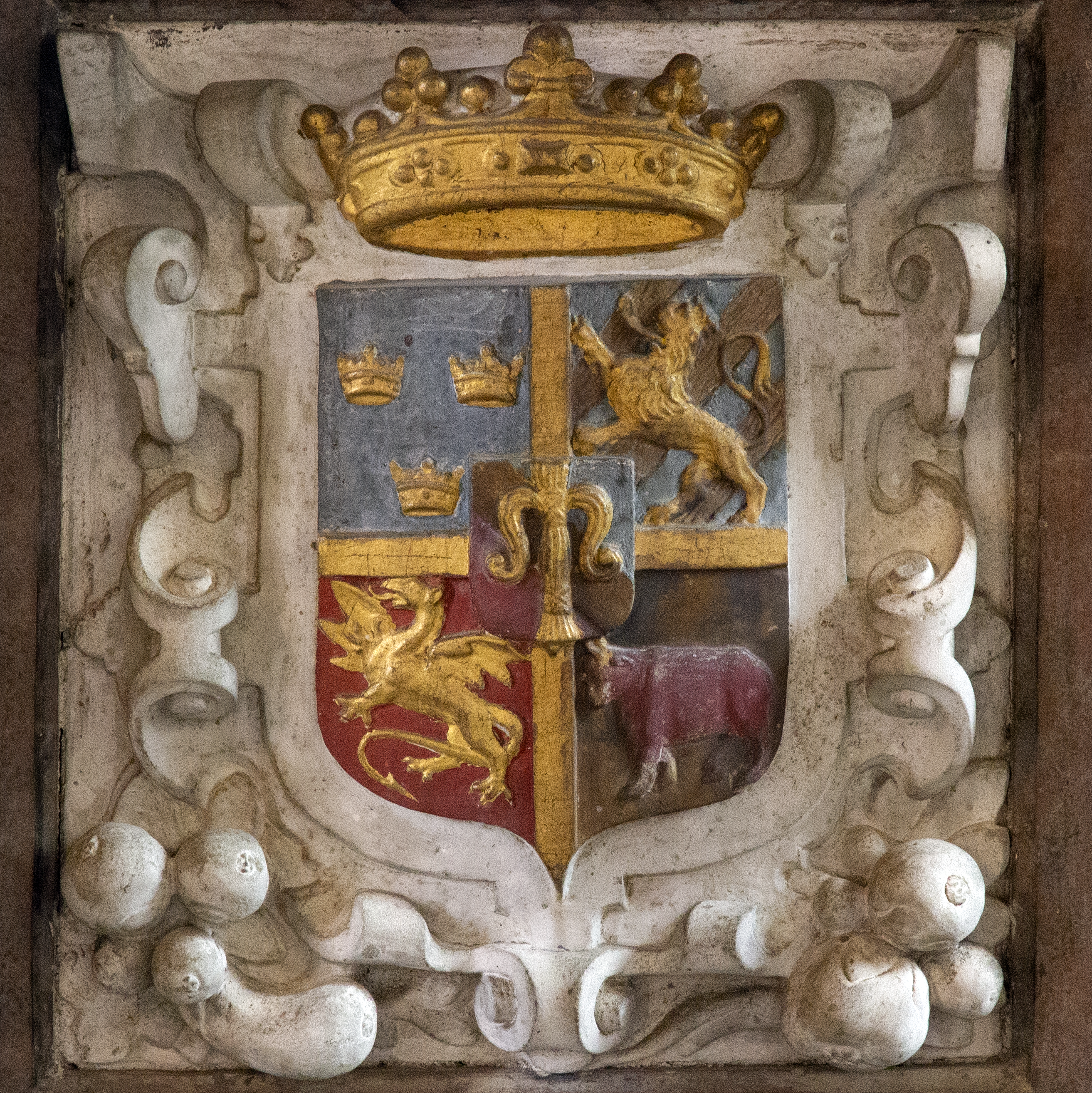 Vapnets huvudsköld är med ett kors av guld delad i fyra fält visande Sverige (tre kronor), Folkungavapnet (lejon över strömmar), Östergötland (drake), samt Dalsland (tjur). Hjärtskölden visar Vasavapnet. Skölden är krönt av en hertigkrona.